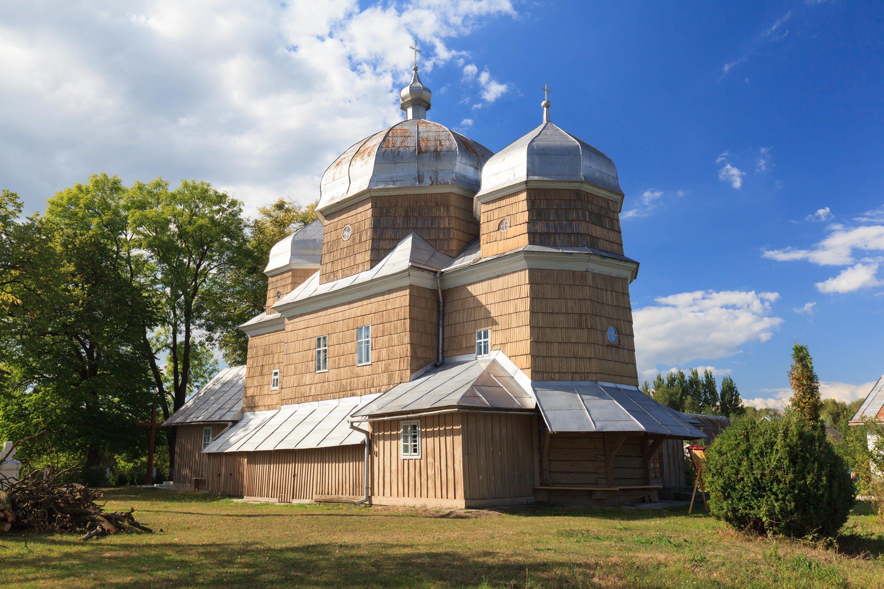 Церква Св. Іллі (дер.), Красне